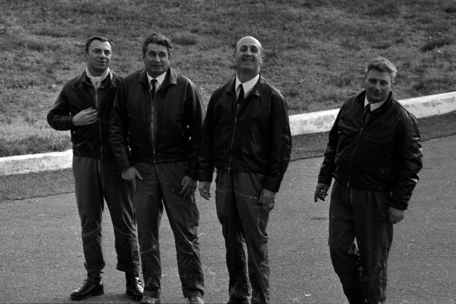 Hall de l'Aérogare Blagnac 1. 2 mars 1969. Vue d'ensemble en plongée du 1er équipage du Concorde (vue de face) de g. à d. : Henri Perrier (pilote), Jacques Guignard (pilote), André Turcat (directeur des essais en vol de Sud Aviation et pilote) et Michel Rétif (mécanicien). Cliché lors du 1er vol d'essai du Concorde.